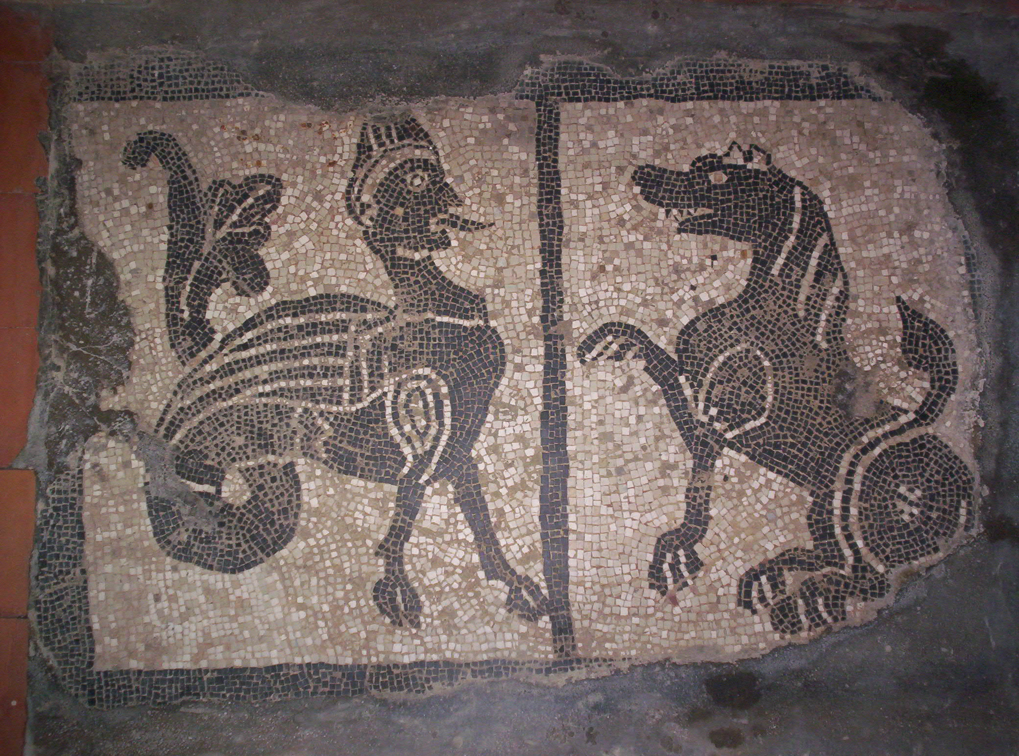 Particolare del mosaico risalente al sec. X conservato presso la chiesa dell'Abbazia di Grazzano badoglio (AT), italia